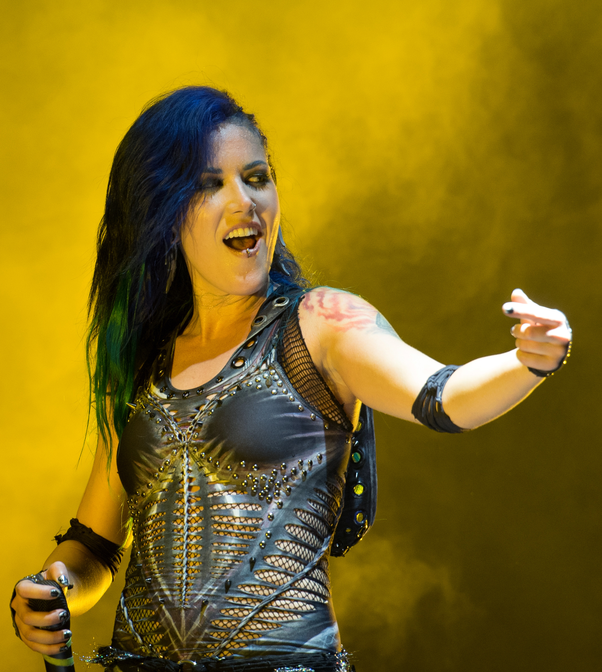 Arch Enemy beim Reload Festival 2016 in Sulingen